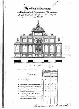 Архітэктар І. В. Міхайлоўскі. Праект іканастаса для Свята-Успенскай царквы ў Сяльцы